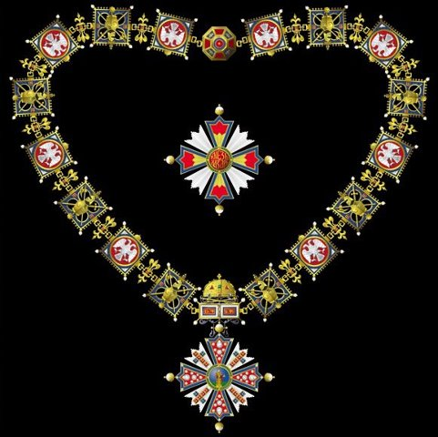 Орден Светог кнеза Лазара